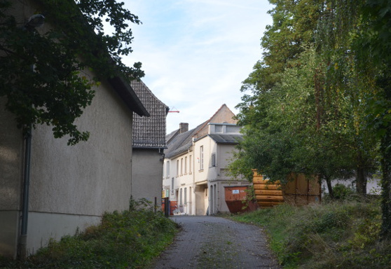 Dallmann-Höfe, ehemaliger Sitz der Firma Dallmann & Co. (Salbei-Bonbons) am Schiersteiner Hafen, kurz vor dem Umbau in Mietwohnungen